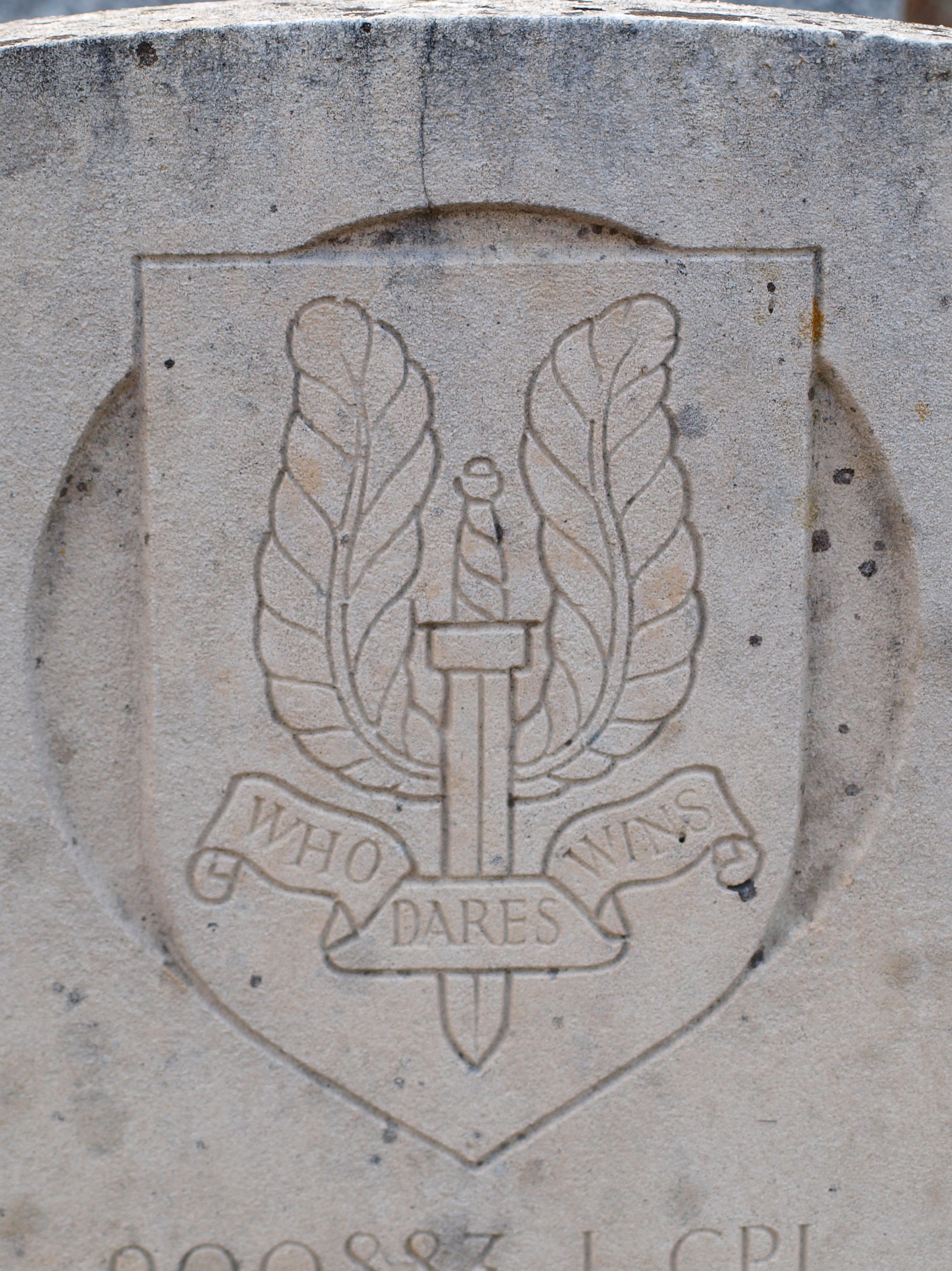 Les Ormes (Yonne, France) ; sépulture Jimmy Hall